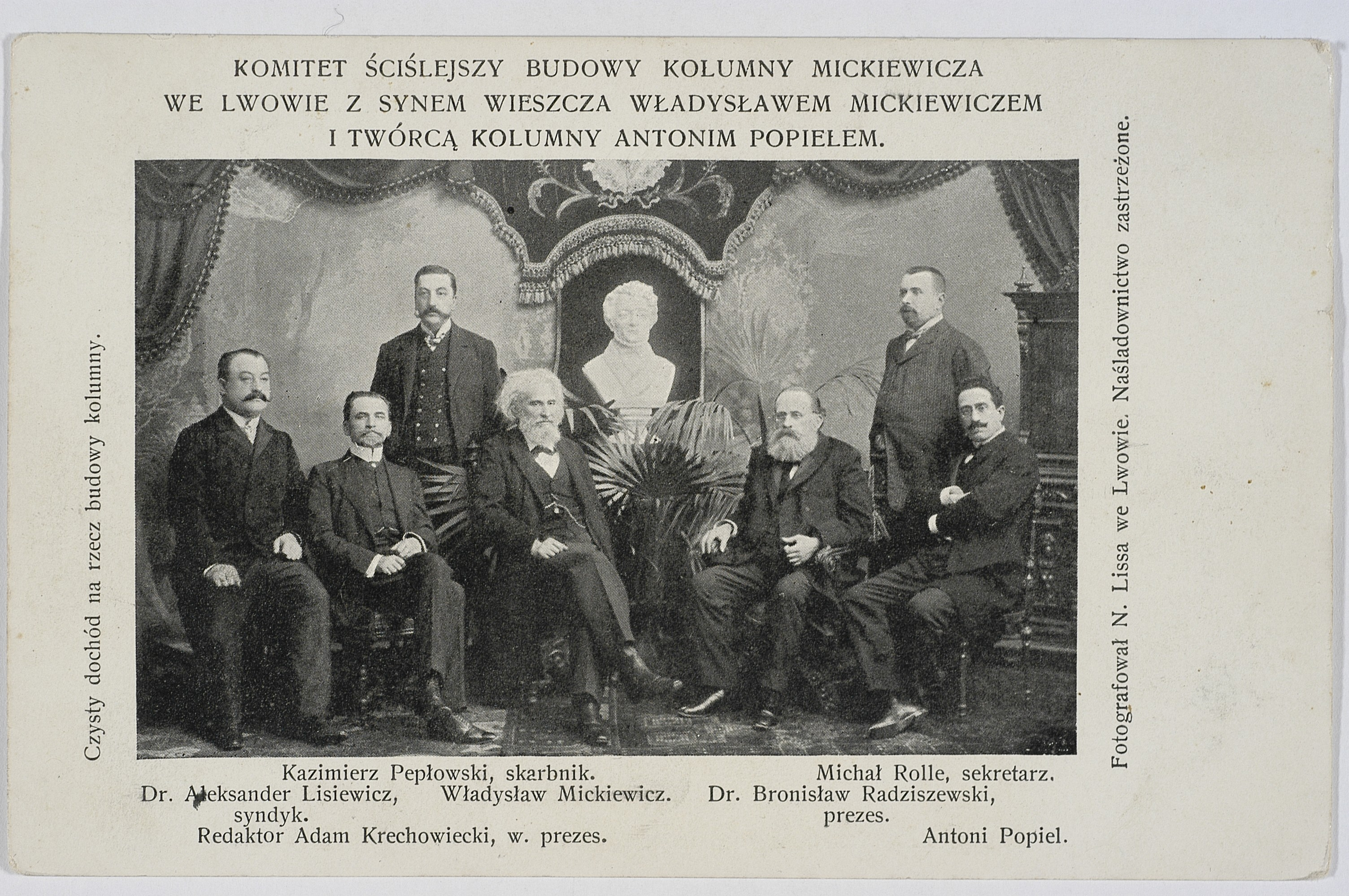 Komitet ściślejszy budowy kolumny Mickiewicza we Lwowie